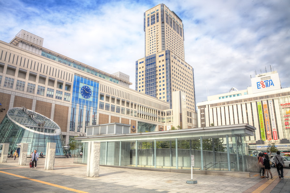 Sapporo station en höstdag.